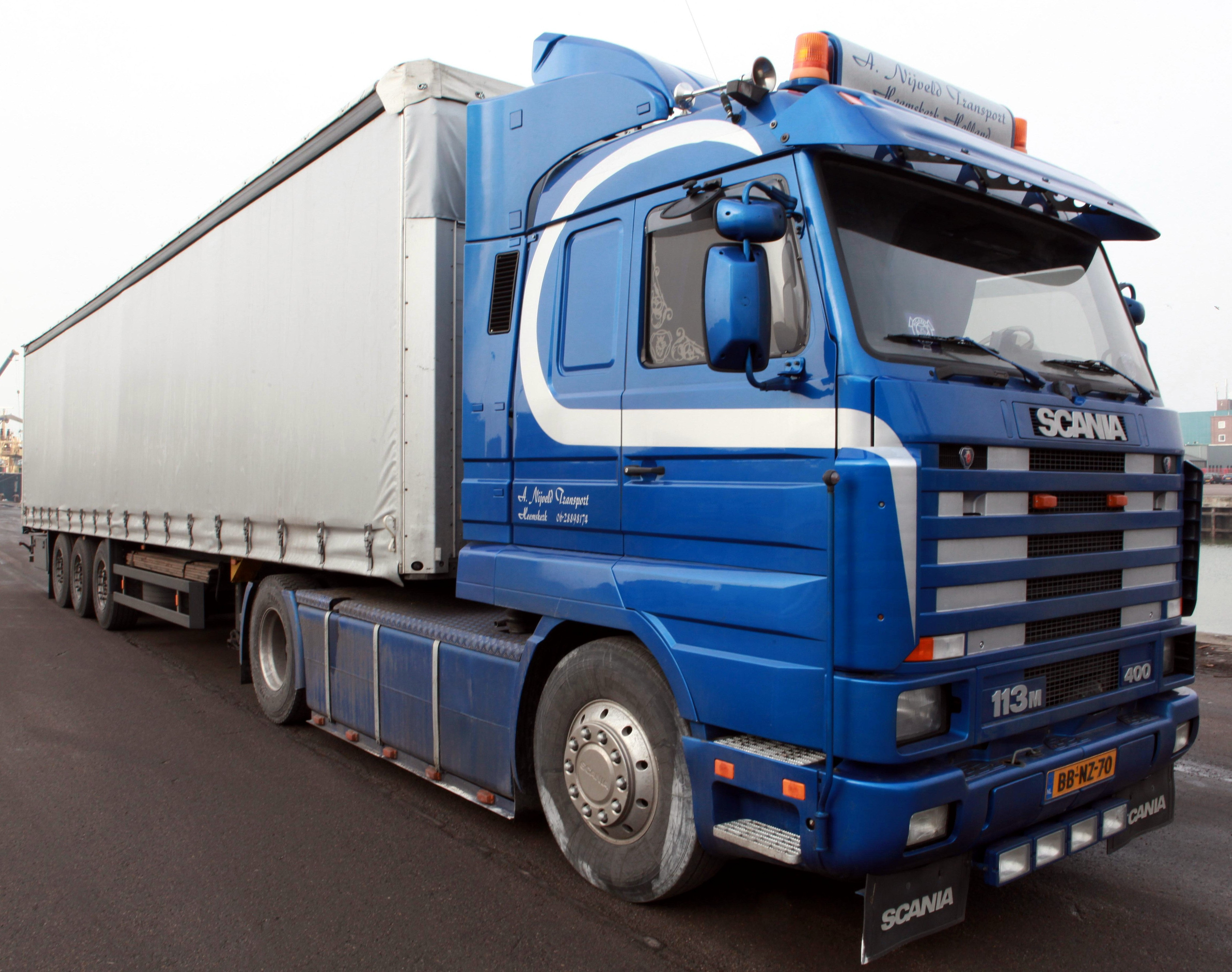 Scania 113 M 400 A. Nijveld Transport Heemskerk.